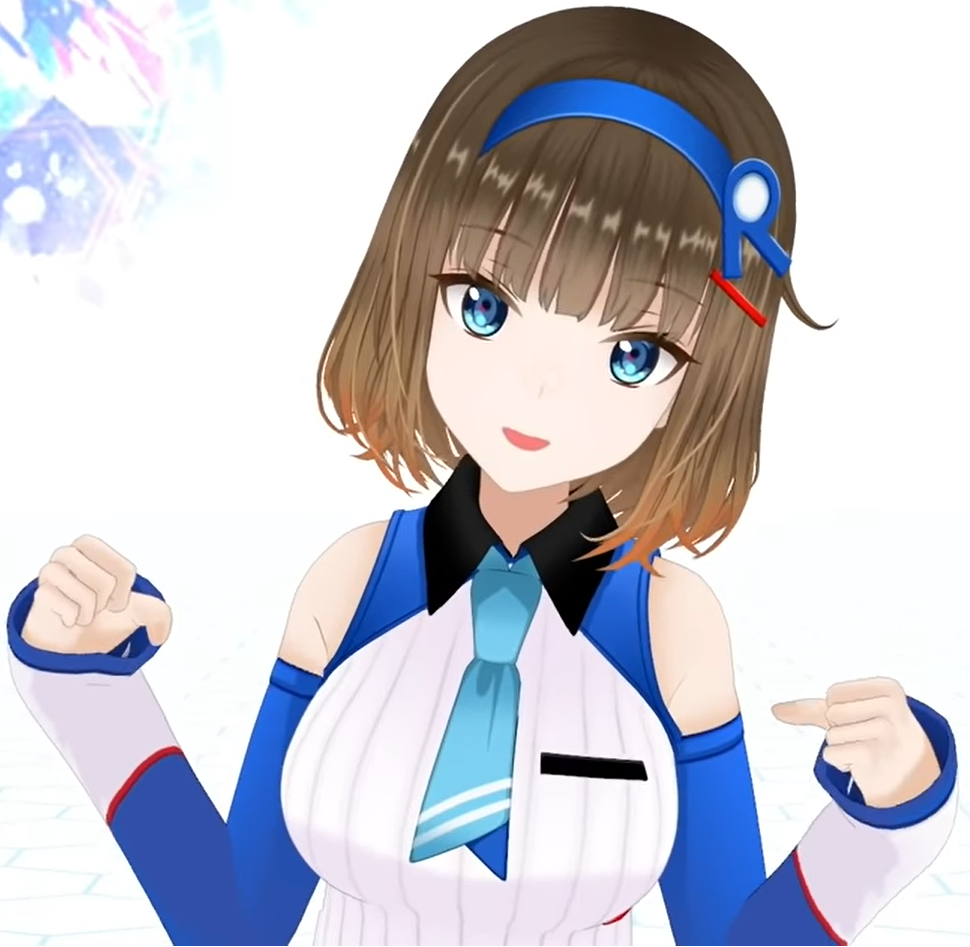 ロート製薬公式ユーチューバーである根羽清ココロ。自身のチャンネルの動画のスクリーンショット。